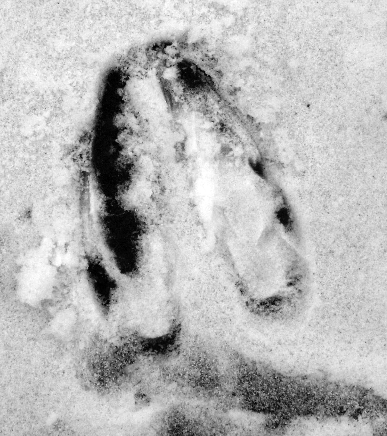 Elchspur im Schnee, 16cm lang